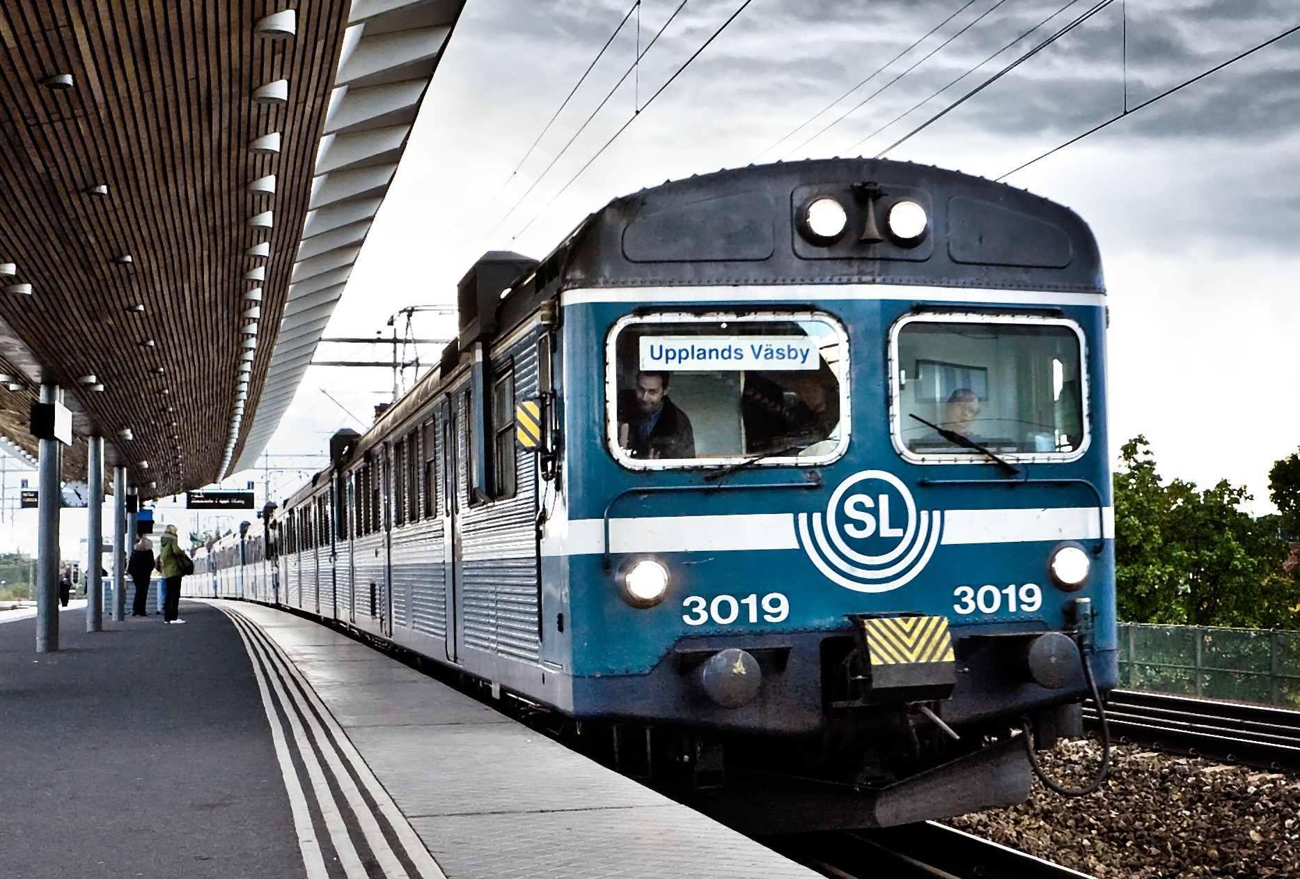 Motorvagn av typ X1 vid Årstaberg